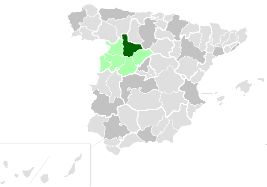 Territorio de la diócesis de Valladolid, mapa